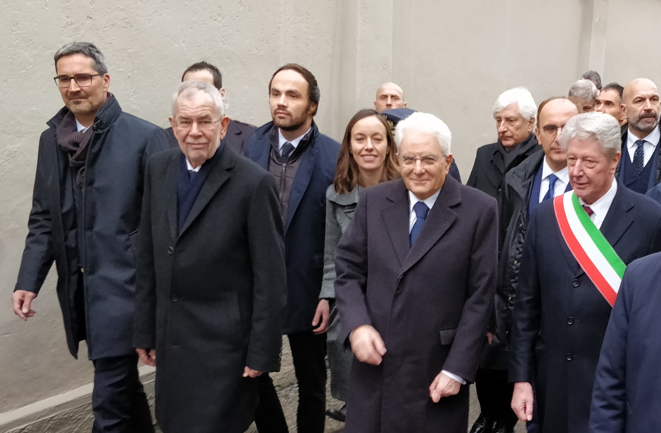 Il presidente della provincia autonoma di Bolzano Arno Kompatscher, il presidente federale austriaco Alexander Van der Bellen, il presidente della Südtiroler Volkspartei Philipp Achammer, il presidente della Repubblica Italiana Sergio Mattarella e il sindaco di Bolzano Renzo Caramaschi in visita al muro di cinta del campo di transito di Bolzano il 23 novembre 2019